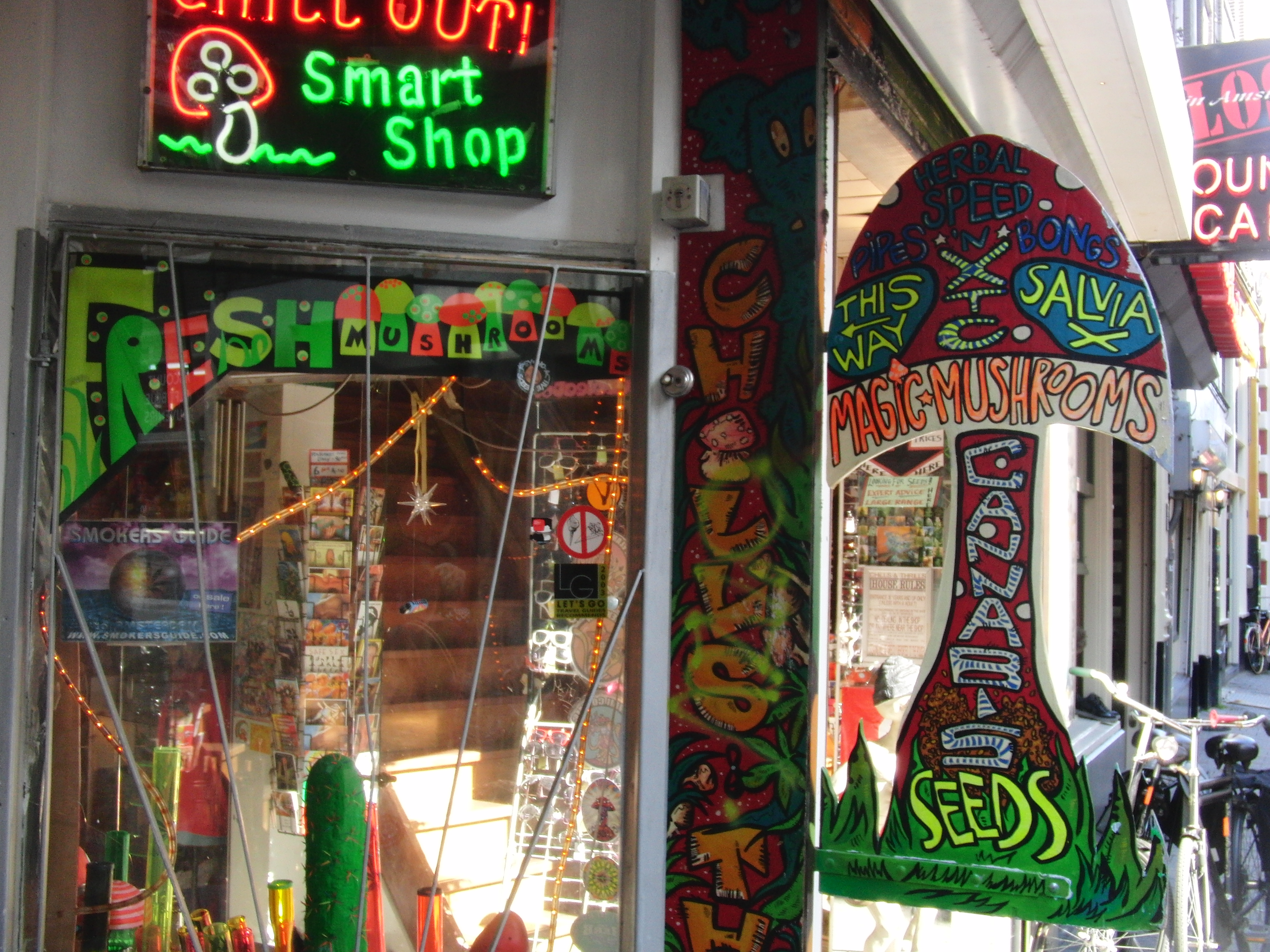 Smartshop Nieuwendijk 17 Amsterdam 2009